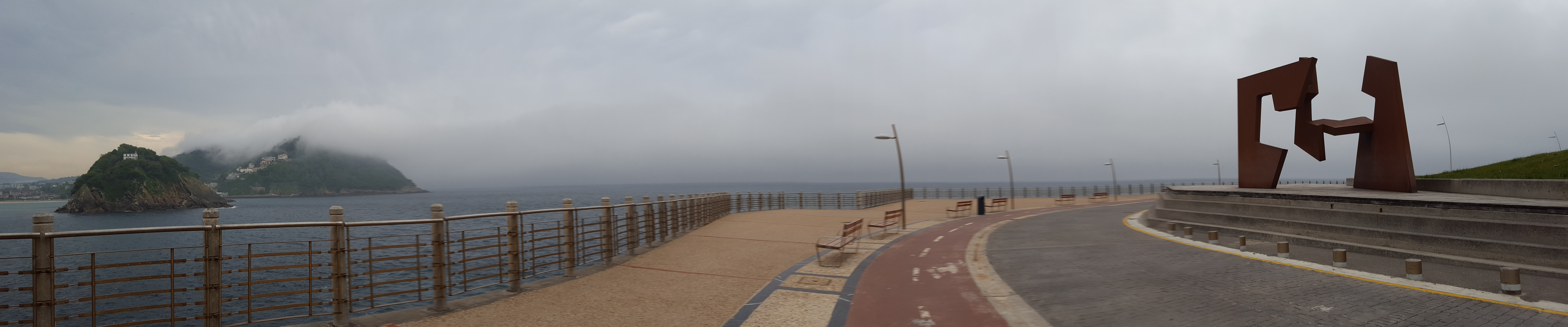 Eskultura Donostiako paseo berrian da